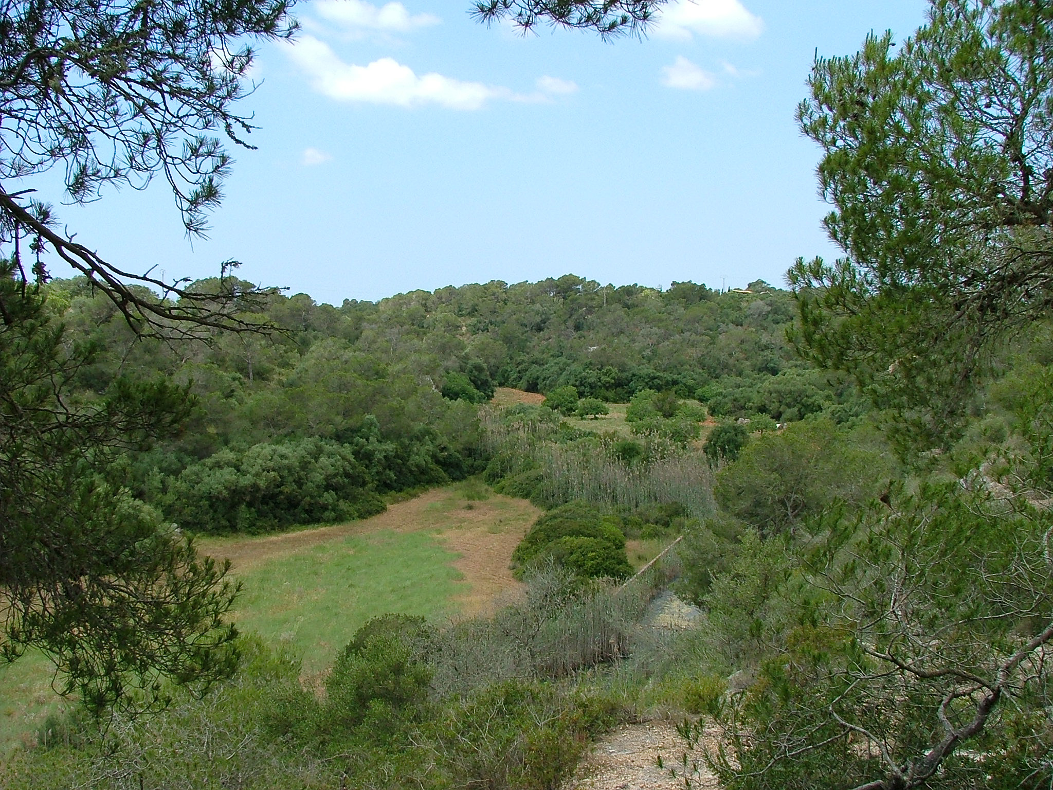 Torrent d'en Roig im Parc natural de Mondragó — Santanyí, Mallorca.